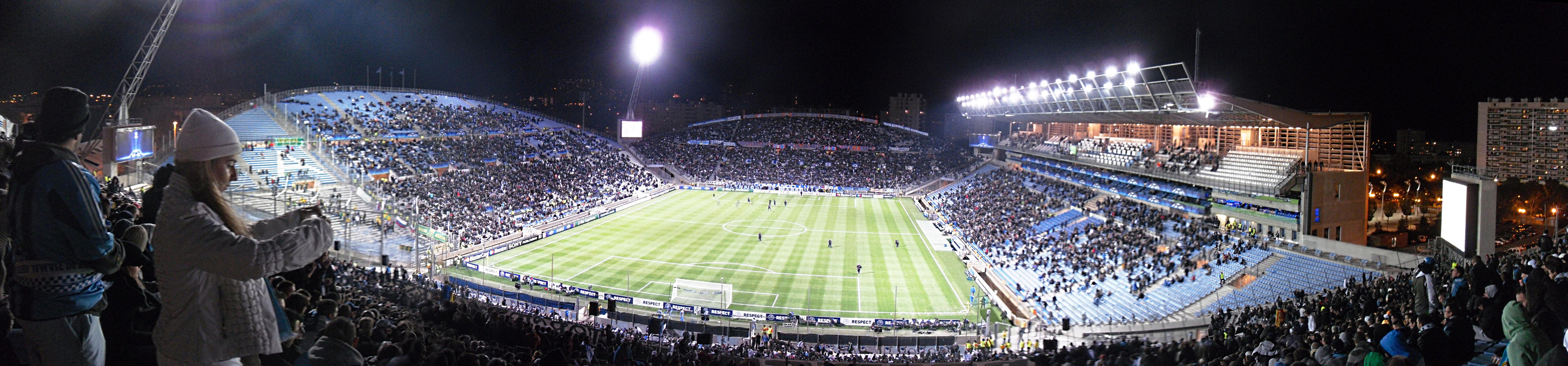 Stade Vélodrome vu du virage nord à la mi-temps du match de ligue des champions Olympique de Marseille - MSK Zilina (1-0)